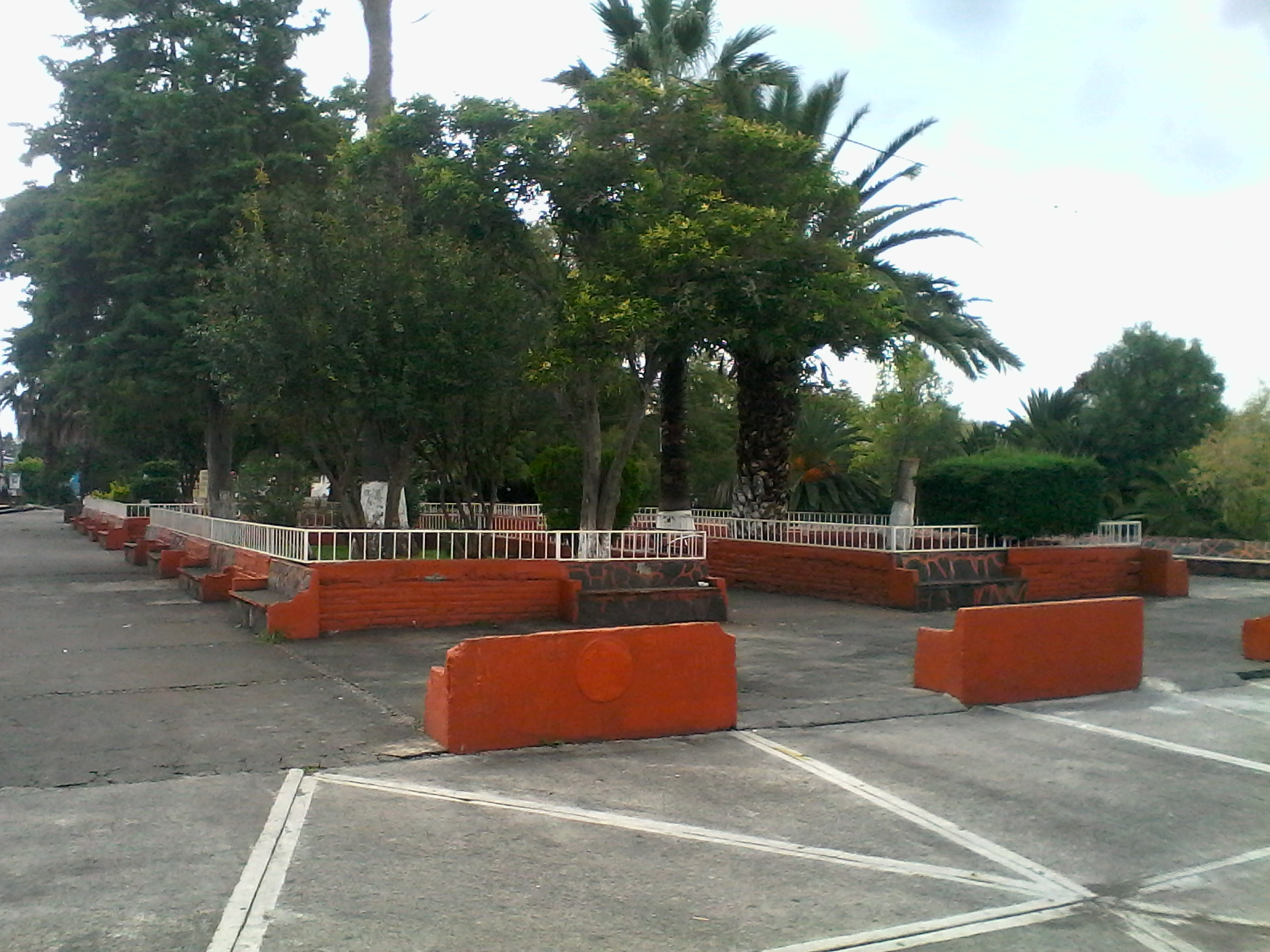 Vista a la Plaza de la comunidad de Bellas Fuentes